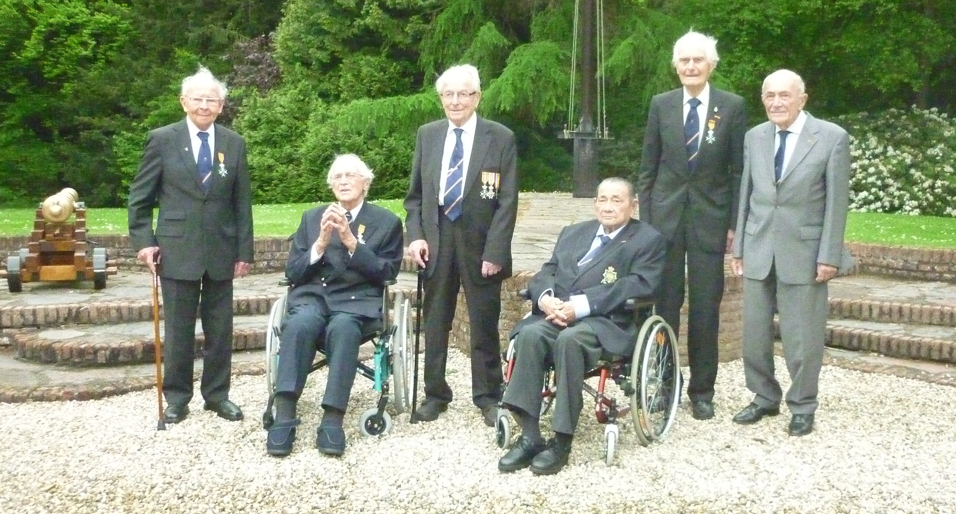 Zes Ridders MWO op De Zwaluwenberg. Tweede van rechts: Kenneth Mayhew